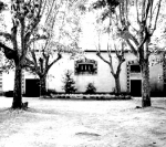 Cave du Château Langlade dans le Gard, photo personnelle de Nicolas Cadène, issu du blog Reproduction sur Wikipedia autorisée à l'identique